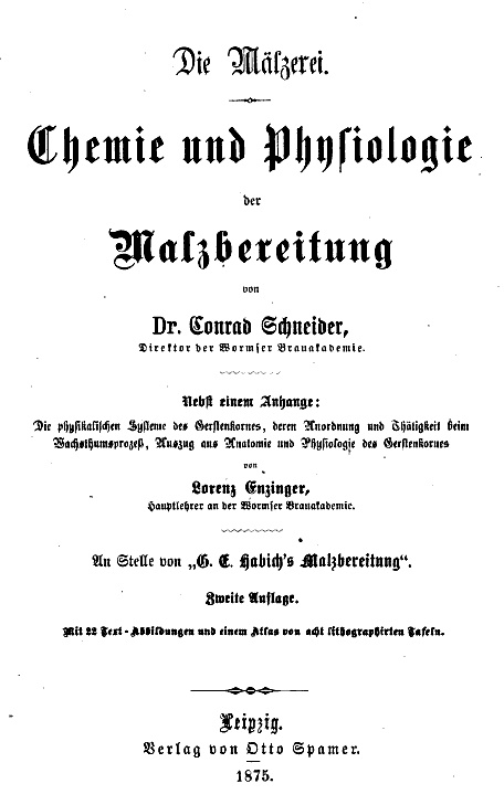 Buchtitelblatt, Fachbuch von Heinrich Konrad Schneider (1828-1898), Gründer und Direktor der Wormser Brauerakademie